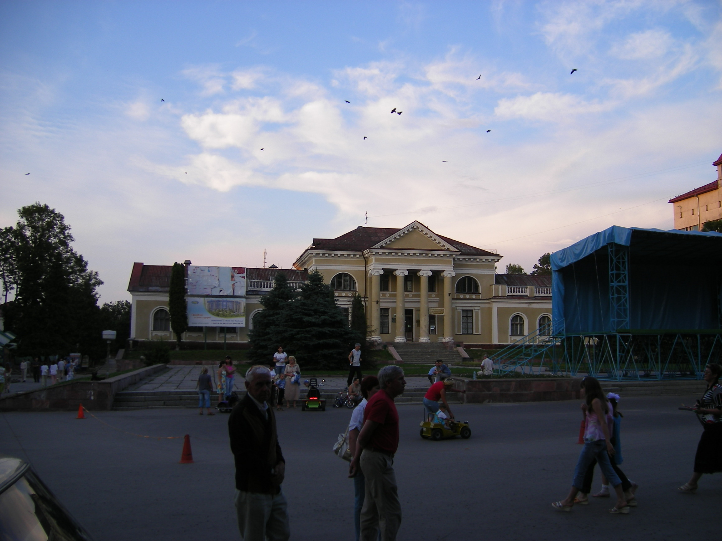 Truskavets